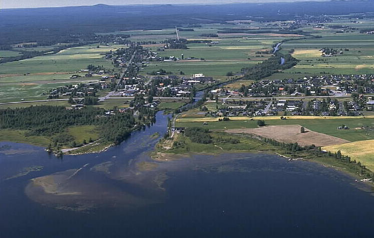 Motiv: Lillpitedalen Nyckelord: Flygbilder, Riksintressen Kategori: Miljöer, OdlingslandskapLillpitedalen